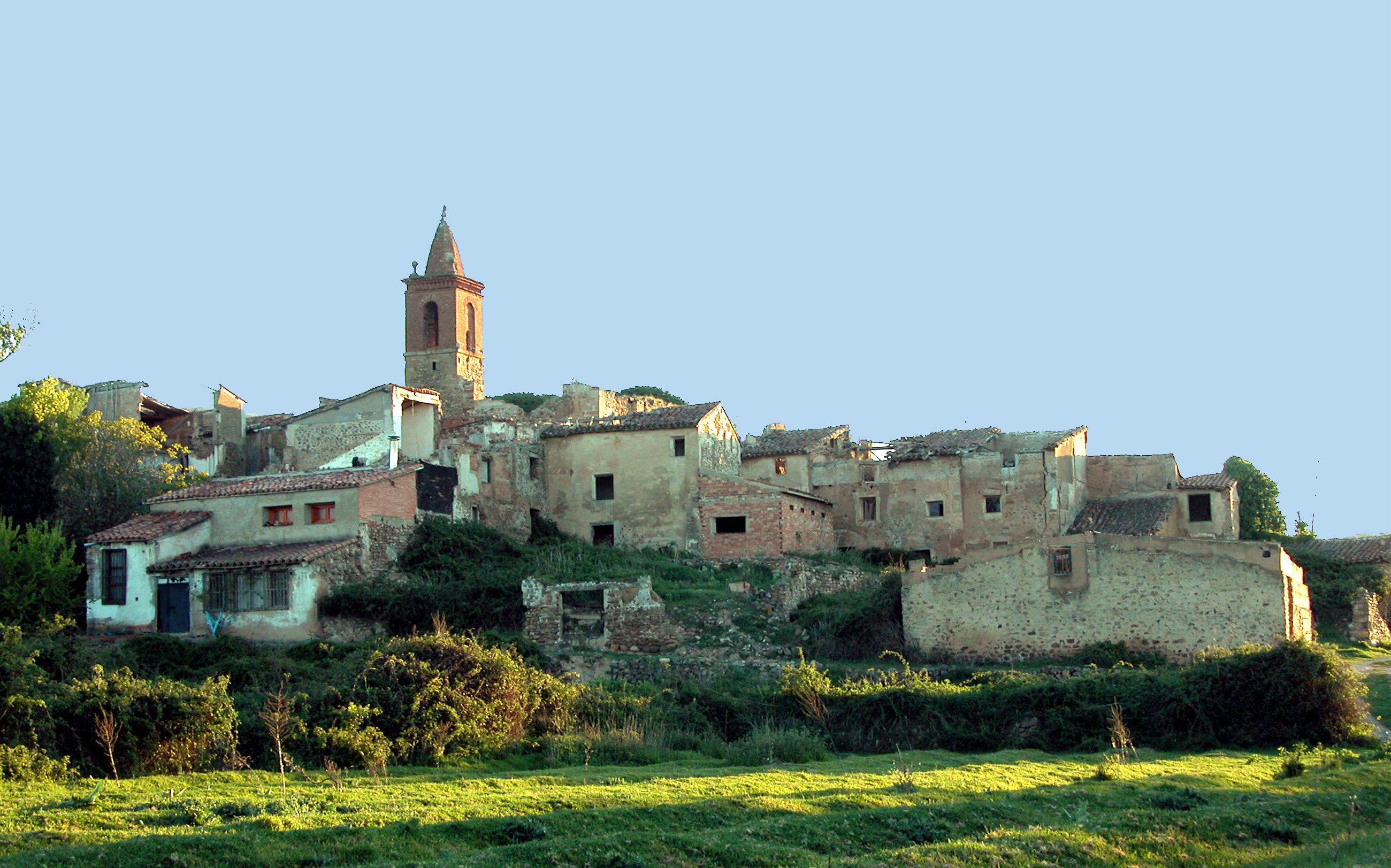 Oteruelo, despoblado de Ocón en La Rioja (España)